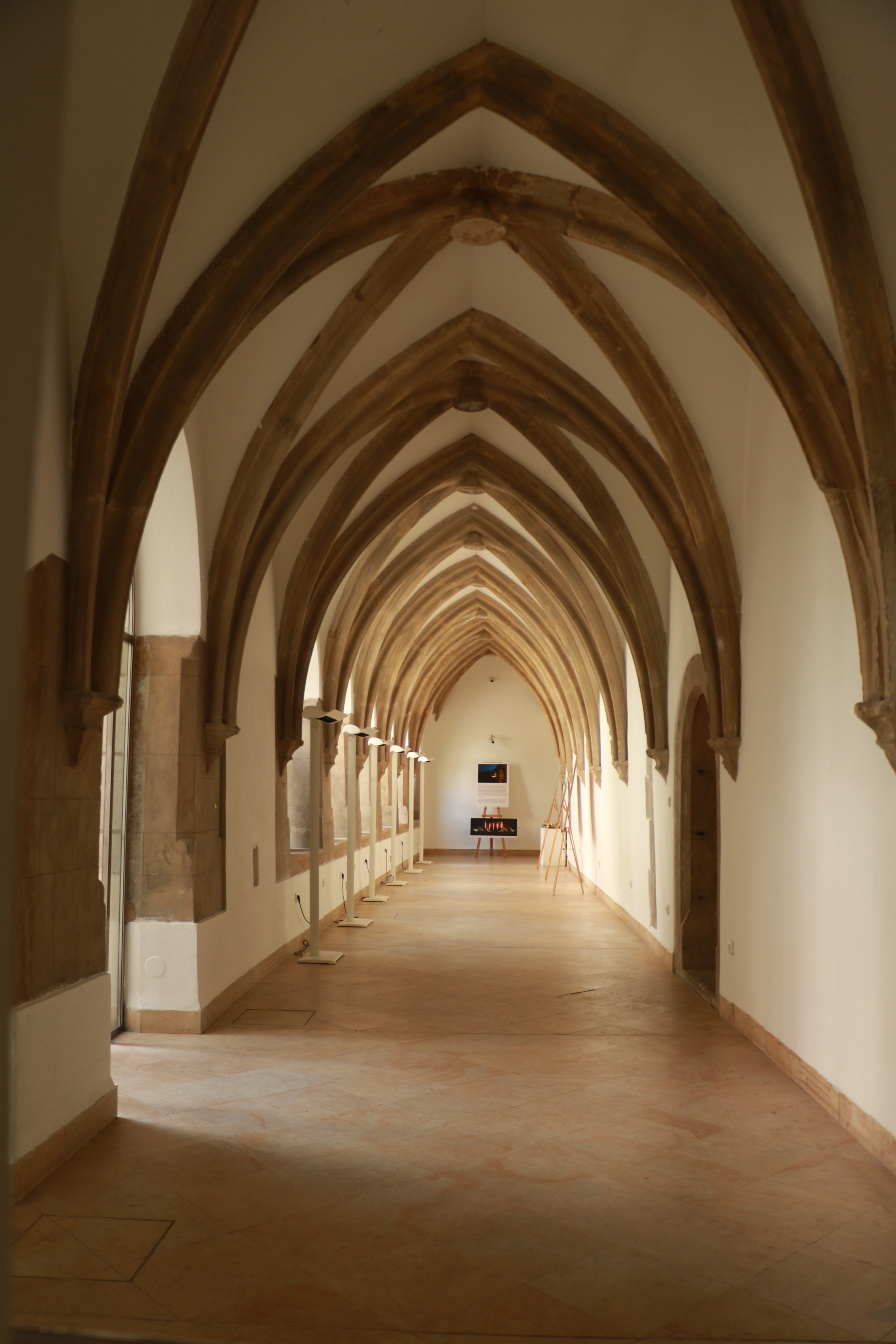 Západní křídlo křížové chodby